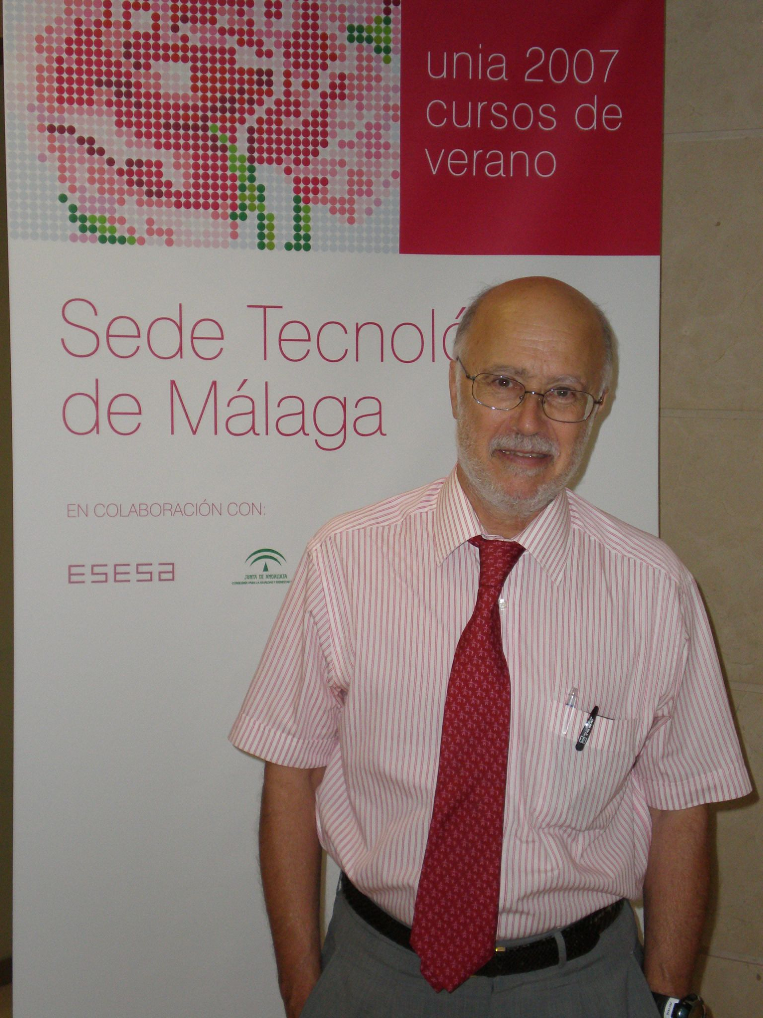 Manuel Toharia en los Cursos de Verano 2007 de la Universidad Internacional de Andalucía, en la Sede Tecnológica de Málaga.